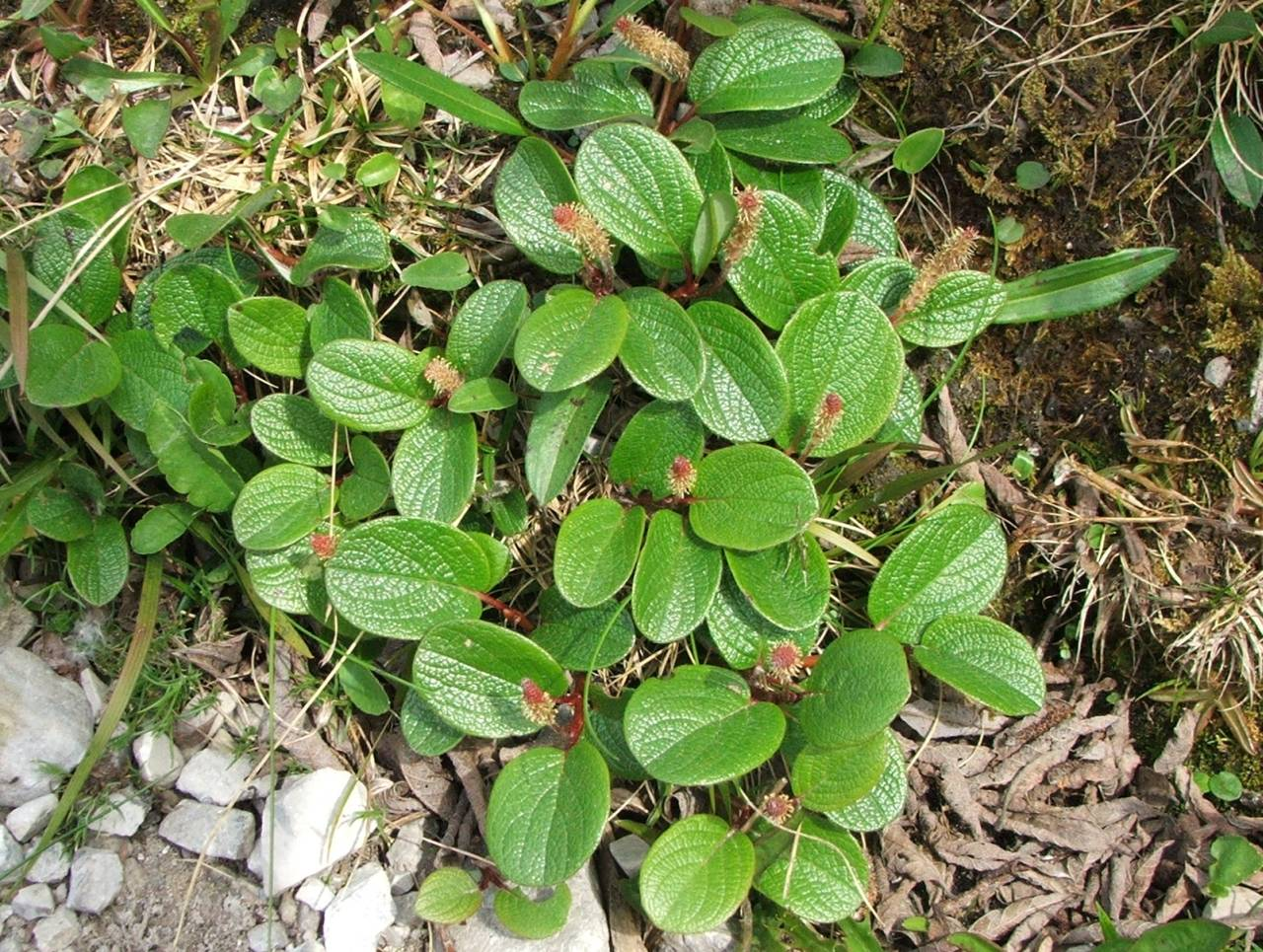 Salix reticulata (pl. wierzba żyłkowana), habitat:Tatra Mountains - Czerwone Wierchy